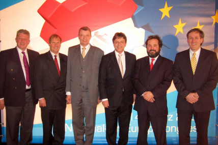 Europakongress 2009